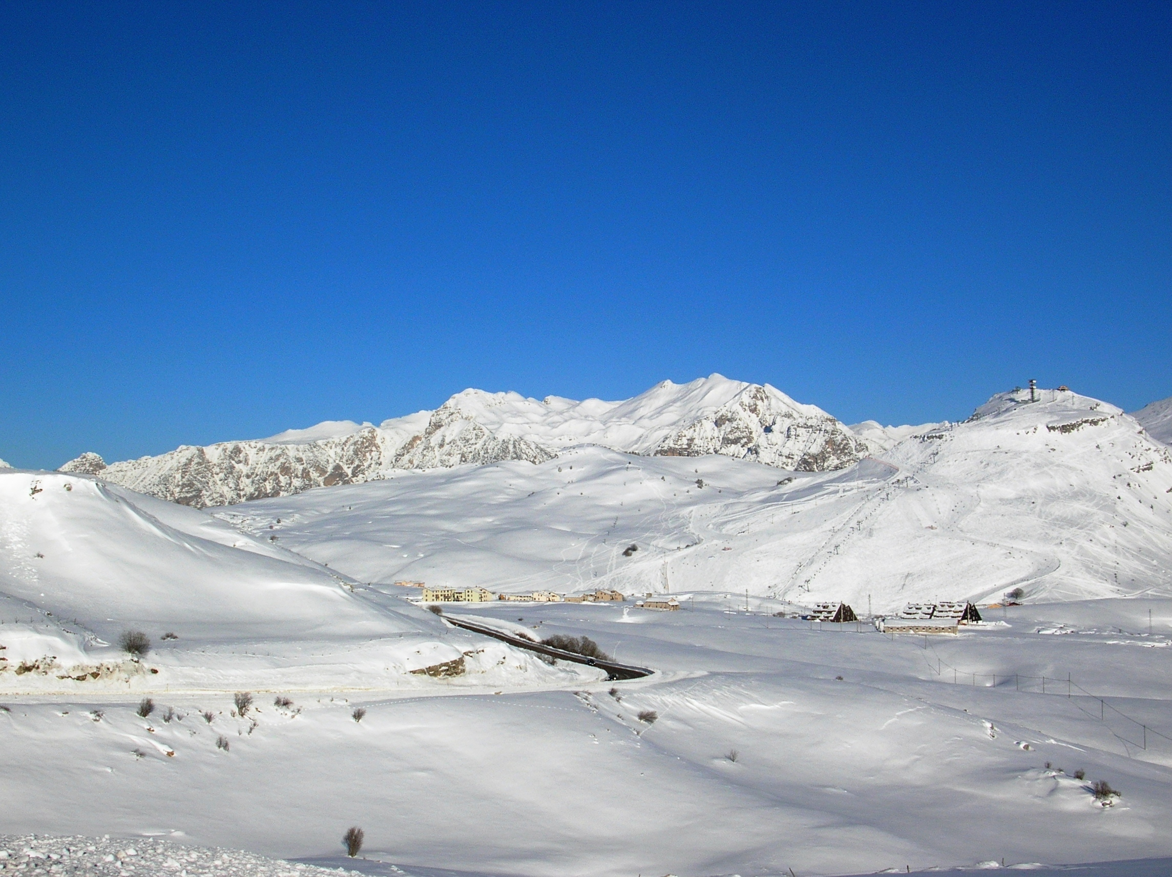 Alta Lessinia in inverno